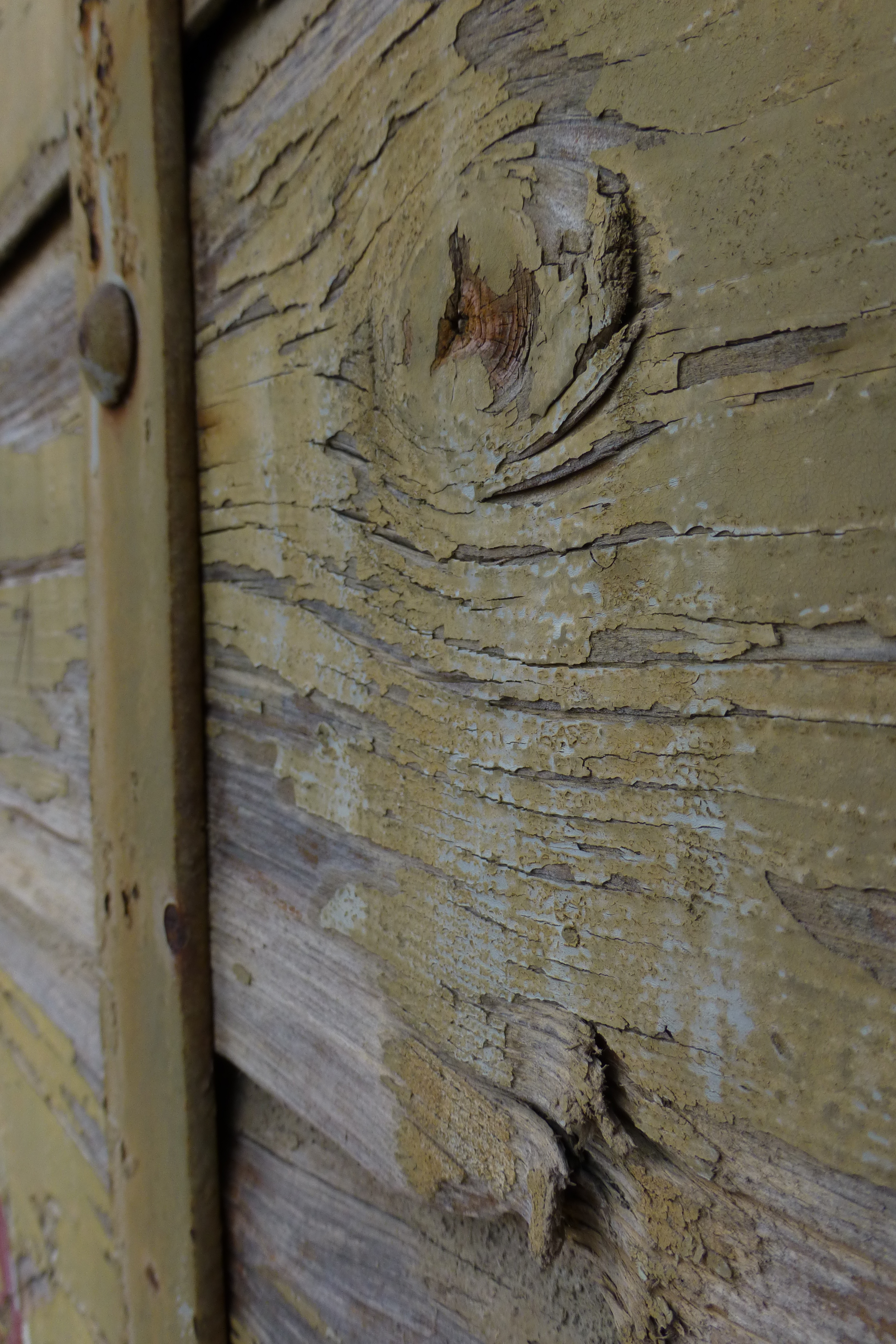 בית המסילאים תחנת רכבת יגור